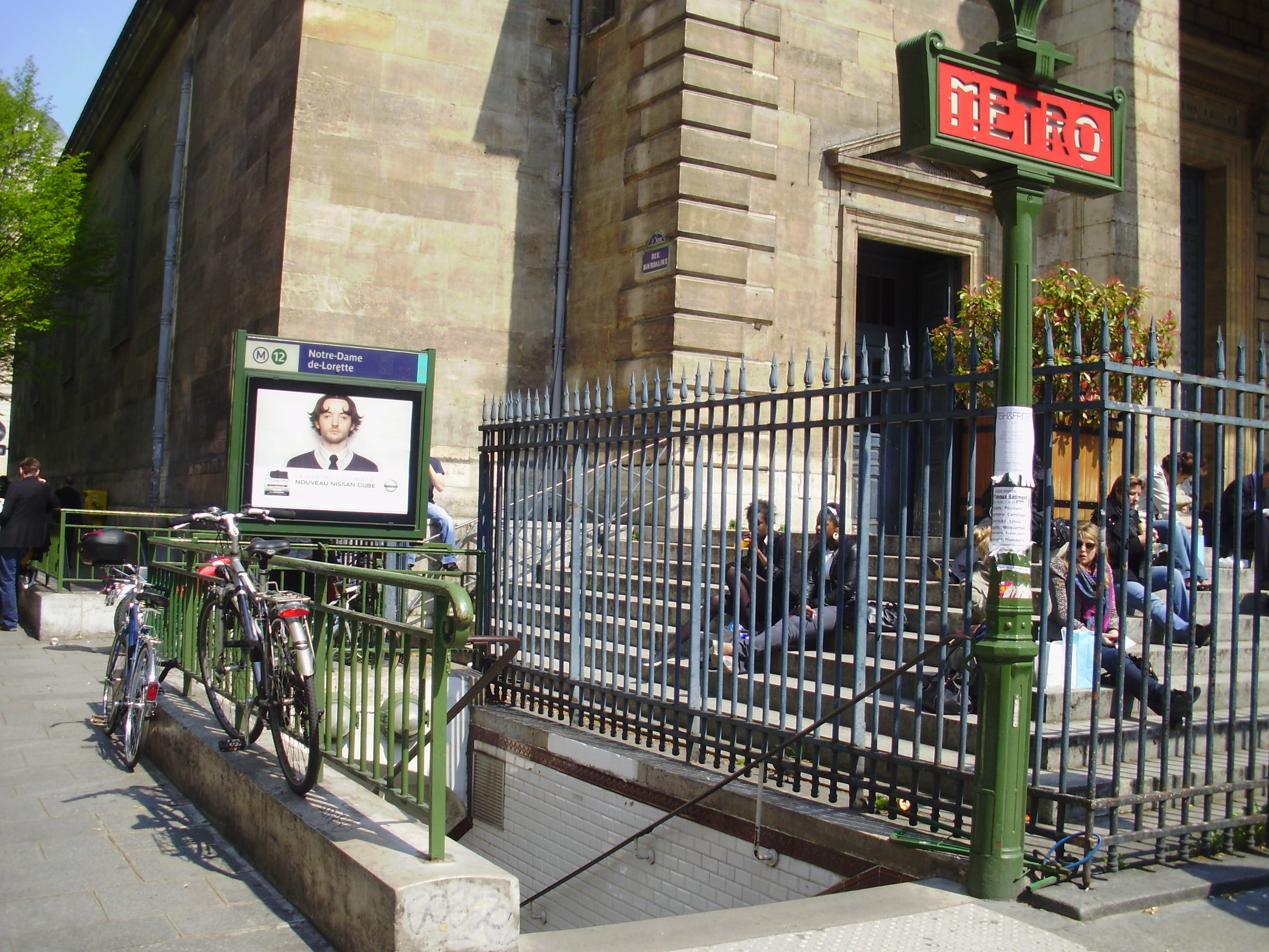 Entrée de la station Notre-Dame-de-Lorette du métro de Paris